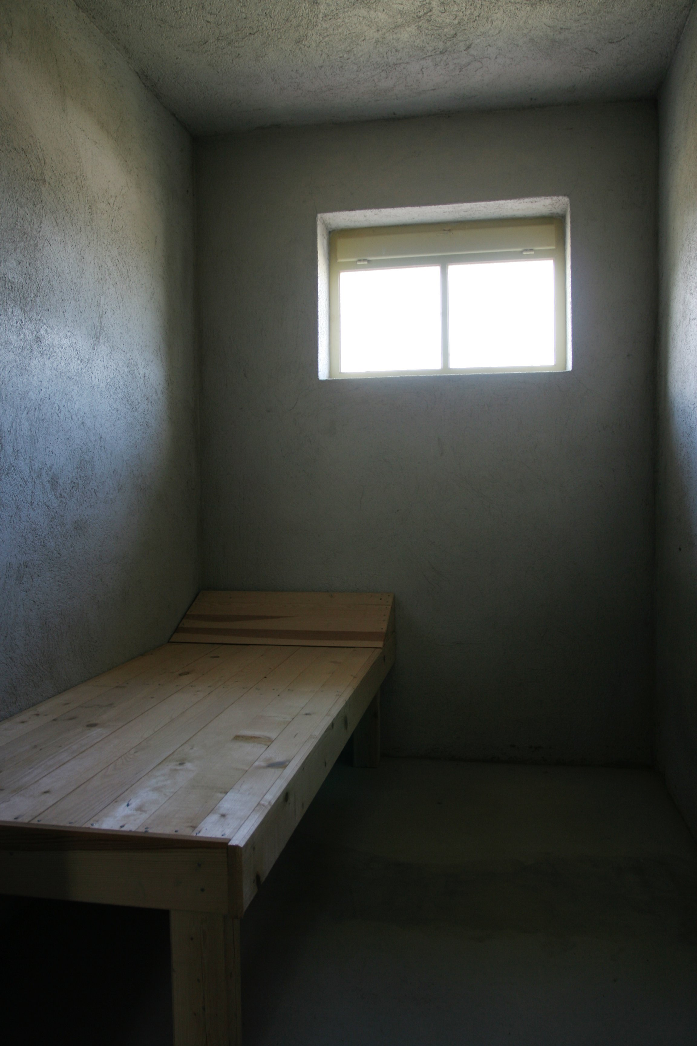 Památník Vojna – "correction" (cell for disruptive prisoners)